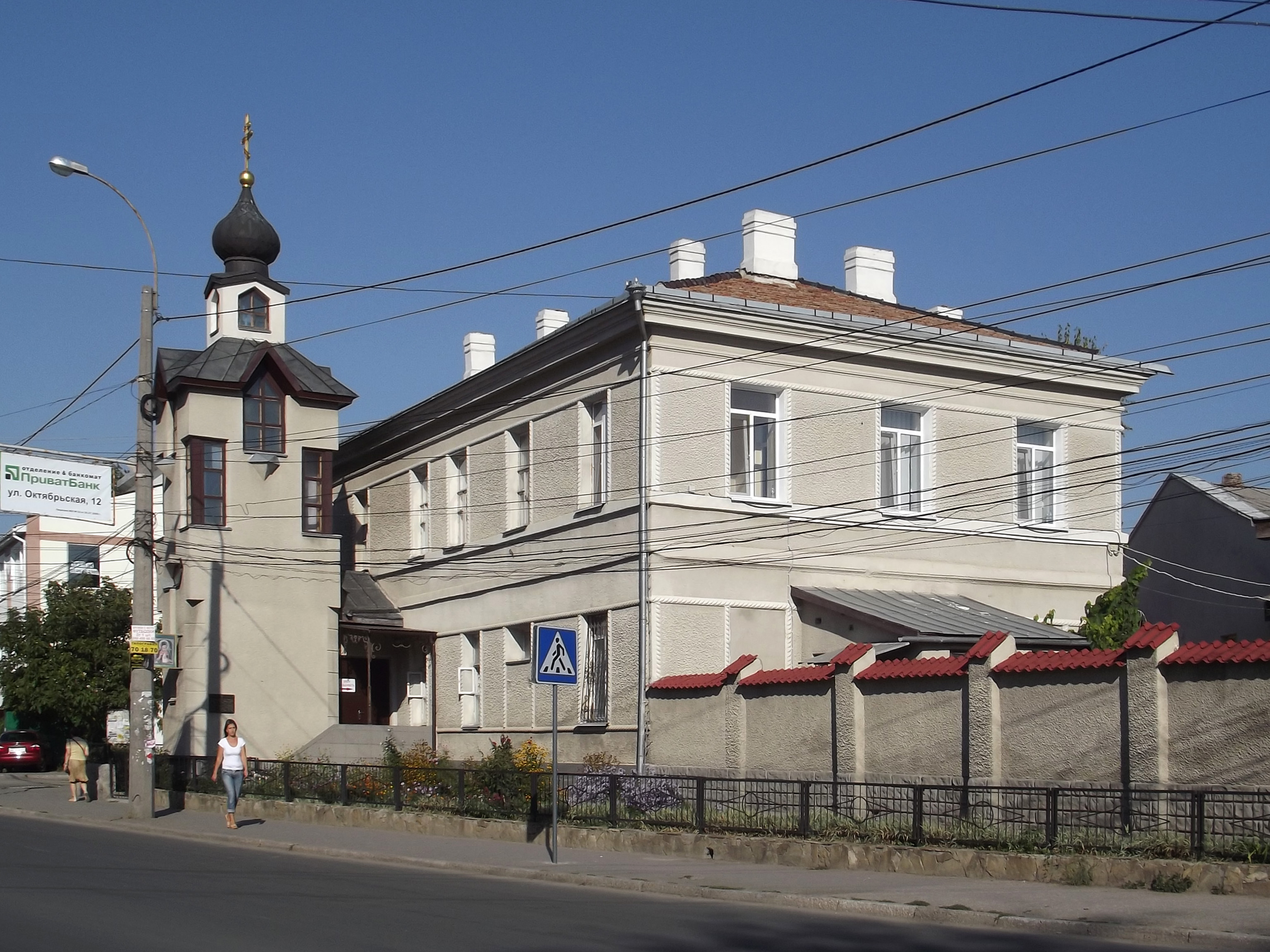 Музей и часовня Св. Луки